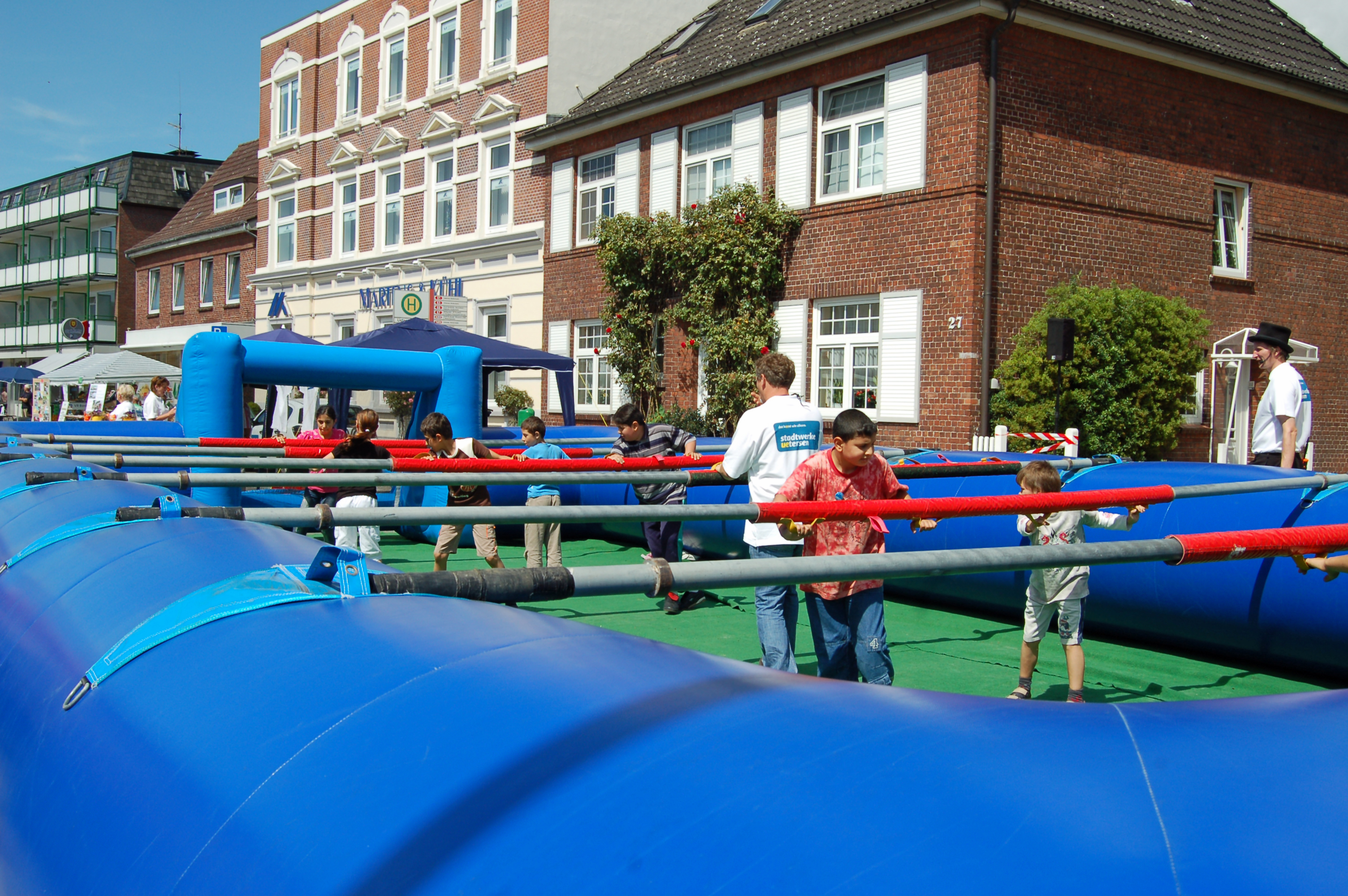 Der Lebend-Fußball-Kicker bei der 775-Jahr-Feier der Stadt Uetersen.